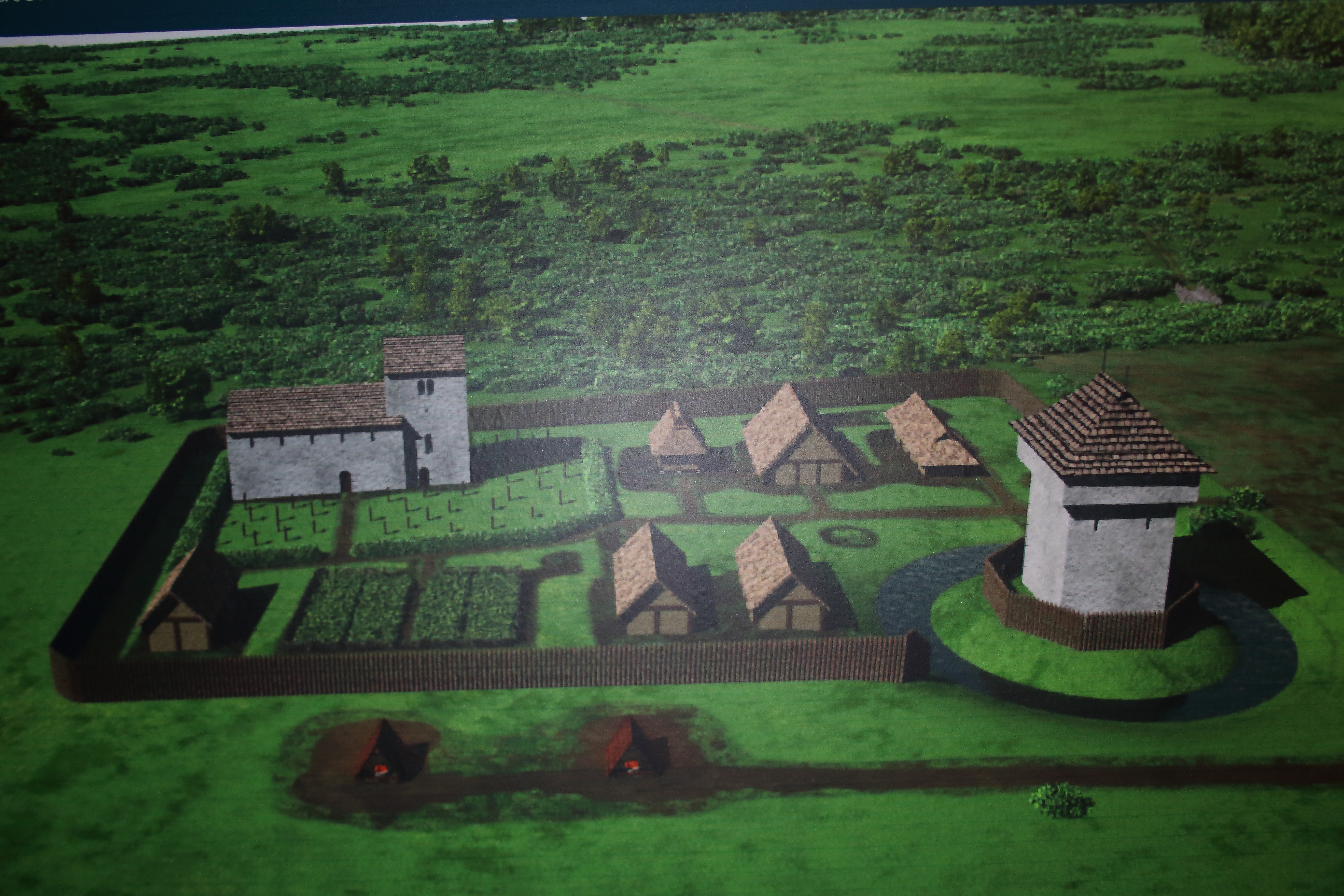 reconstructie Egmontkasteel Zottegem 1150, tentoonstelling 'Graven in Vryheydt' Provinciaal Archeocentrum AVE Velzeke